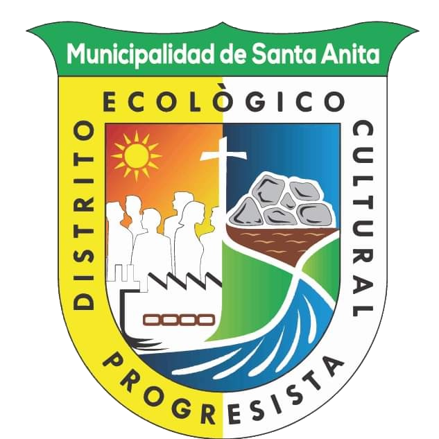 Escudo distrito de Santa Anita, Lima, Perú